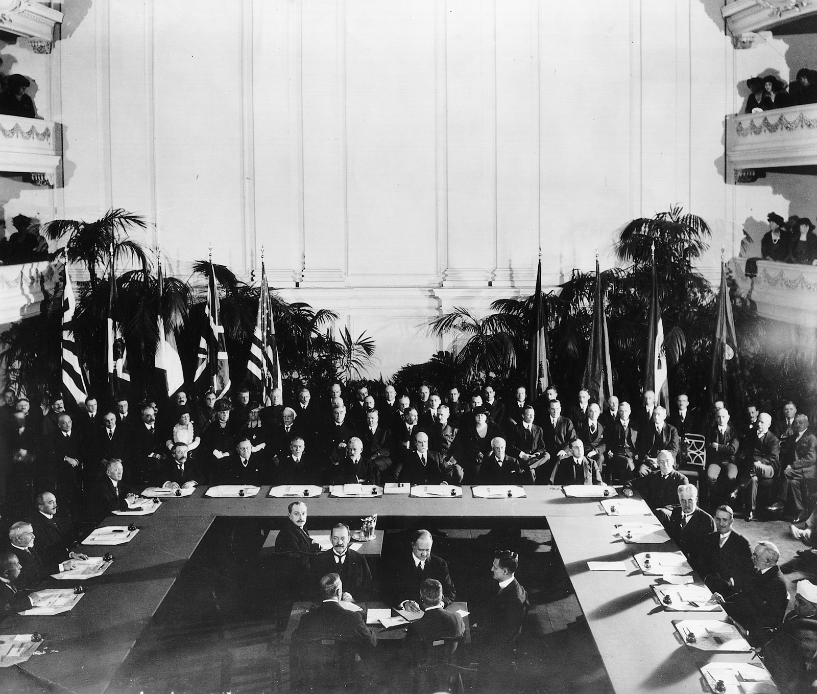 Վաշինգտոնի համաձայնագիր